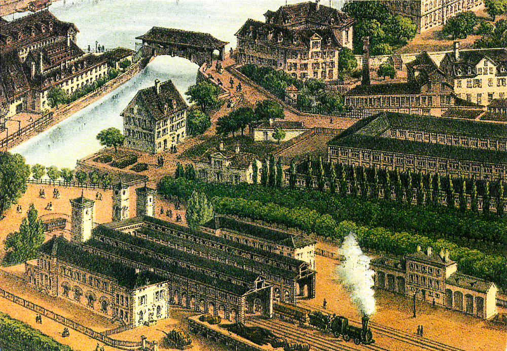 Zurich Urbahnhof am Stadtrand, Lithographie, Holzschnitt